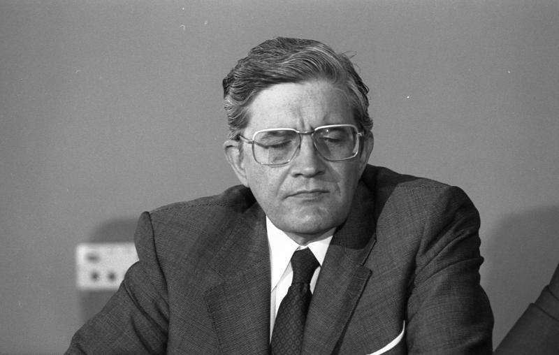 Pressekonferenz der Innenminster der Länder mit Bundesminister Gerhard Rudolf Baum im Bundesrat